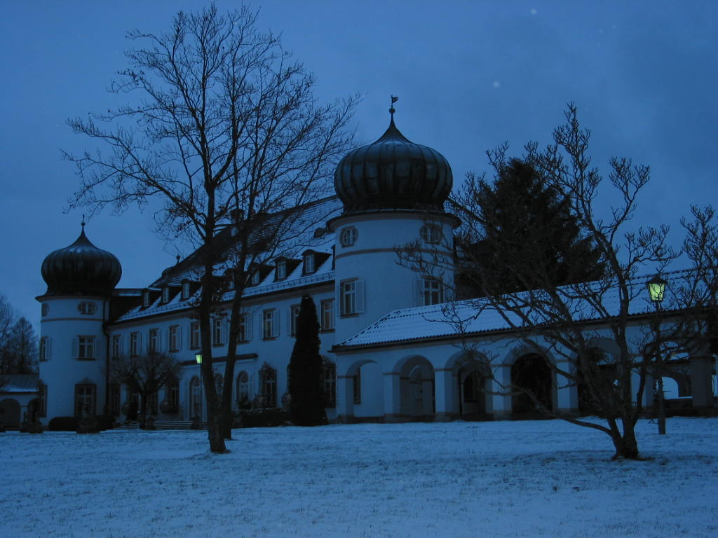 Schloß HöhenriedThis is a photograph of an architectural monument.